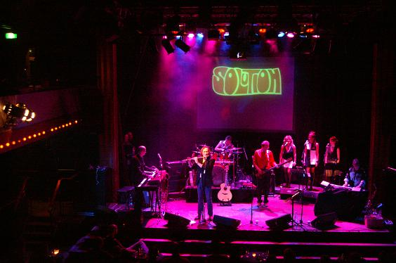 Solution met gasten in Club Panama, Amsterdam 2006 Foto Gijs Kleinveld